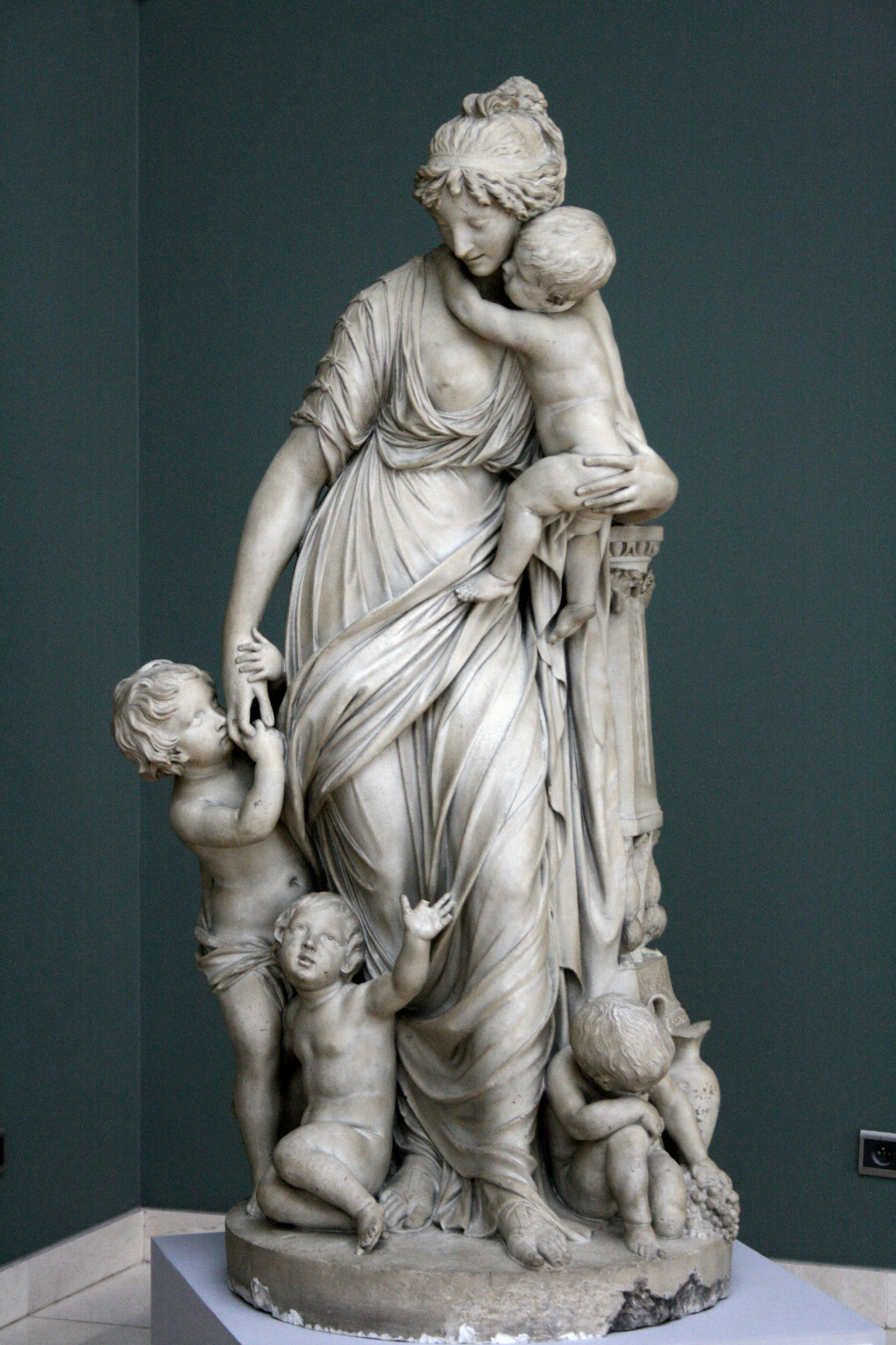 La Charité par Gilles-Lambert Godecharle, Musées royaux des Beaux-Arts de Belgique, Bruxelles (Belgique)